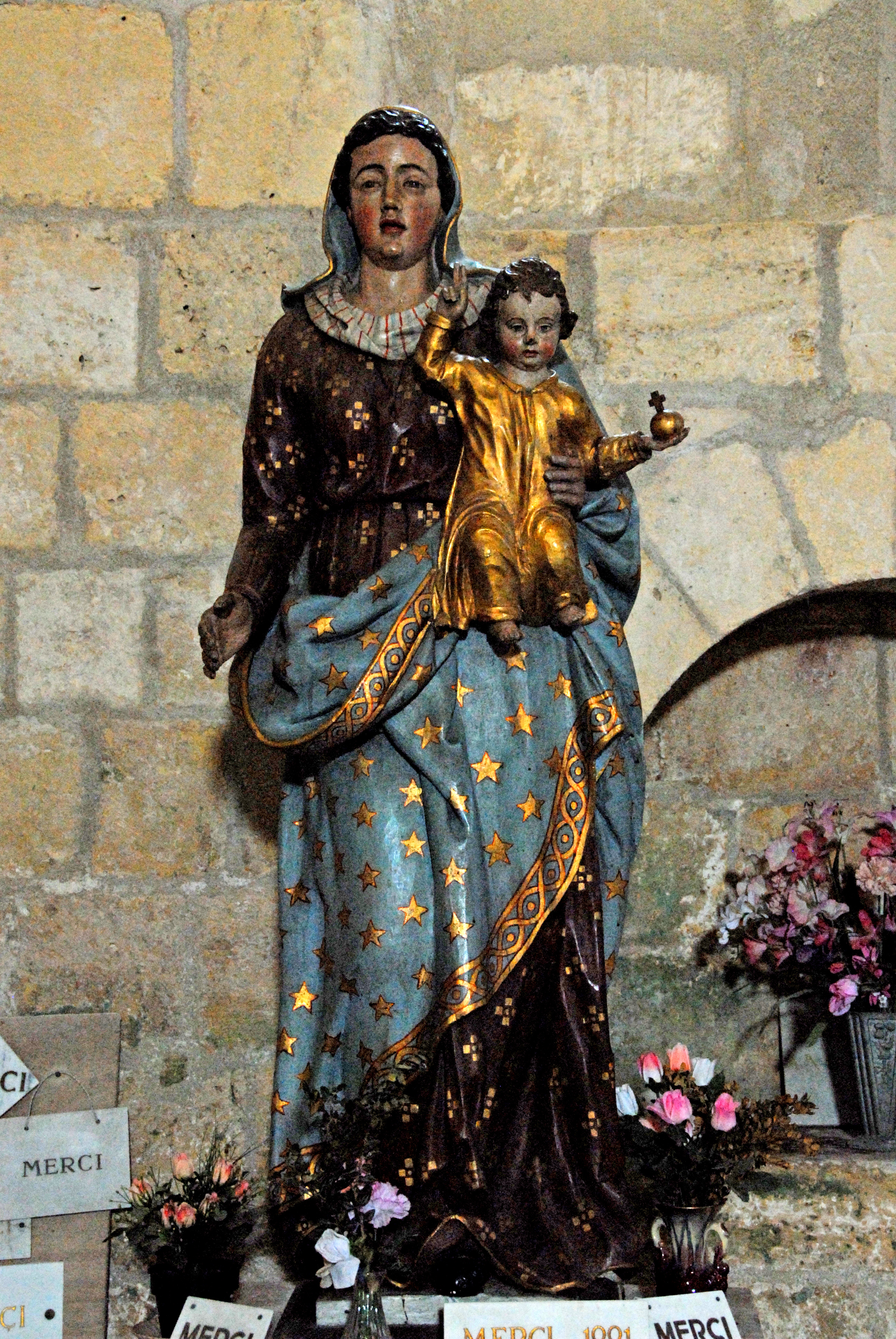 Saint-Bris-de-Bois, Madonna mit Kind, 12.Jh., in Kapelle 1